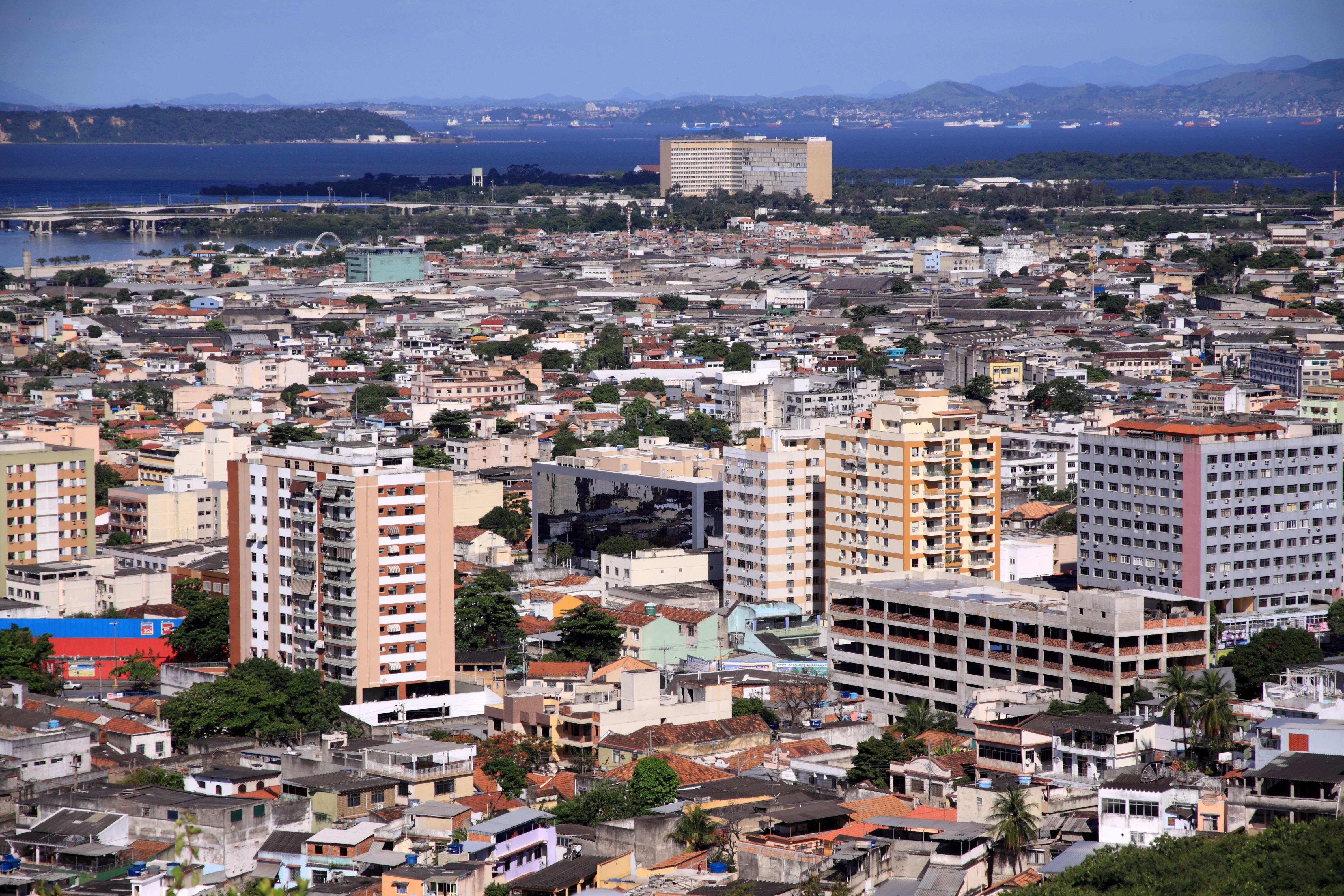 Prédio do Hospital Universitário da UFRJ na Ilha do Fundão, ao fundo, visto da Igreja da Penha.